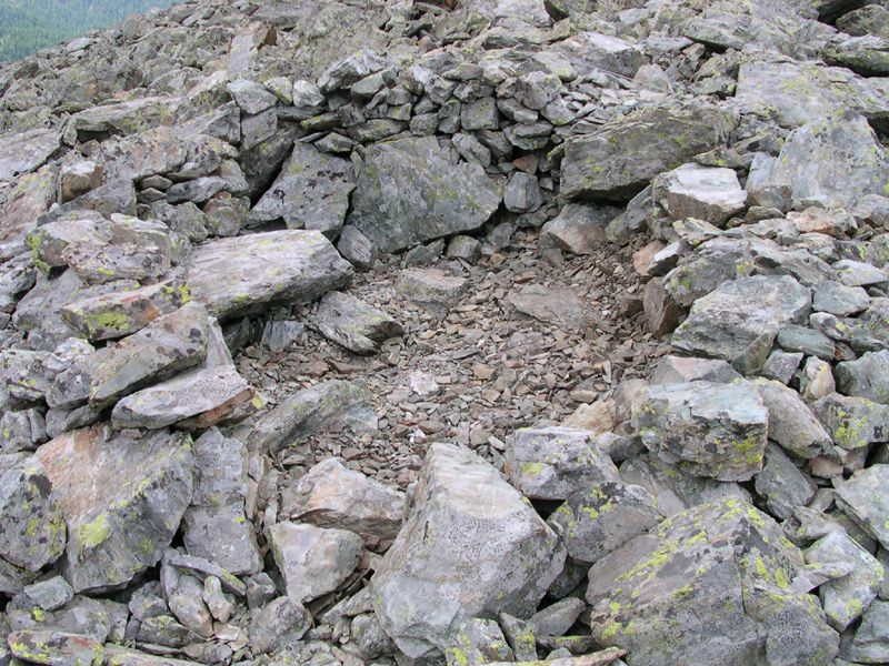 Capanna dei Salassi (2437 m), villaggio Tantané risalente all'età del ferro. Lo si raggiunge dalla frazione Artaz di La Magdeleine, Valle d'Aosta, Italia.